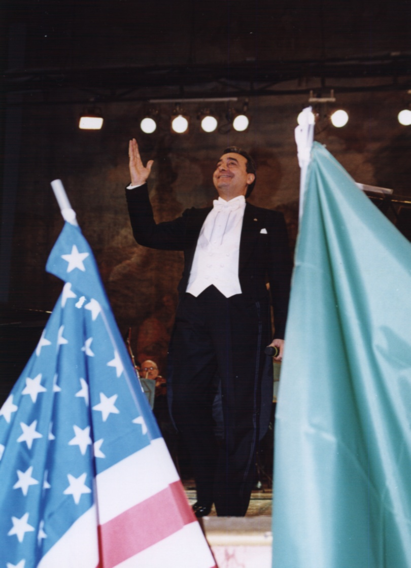 Venturini durante il concerto "Omaggio a Caruso" al Teatro di Corte della Reggia di Caserta.